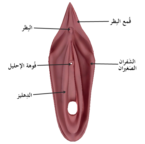 جانب من الجهاز التناسلي الأنثوي يظهر فيه البظر والشفران الصغيران والدهليز وفتحة الإحليل وقمع البظر